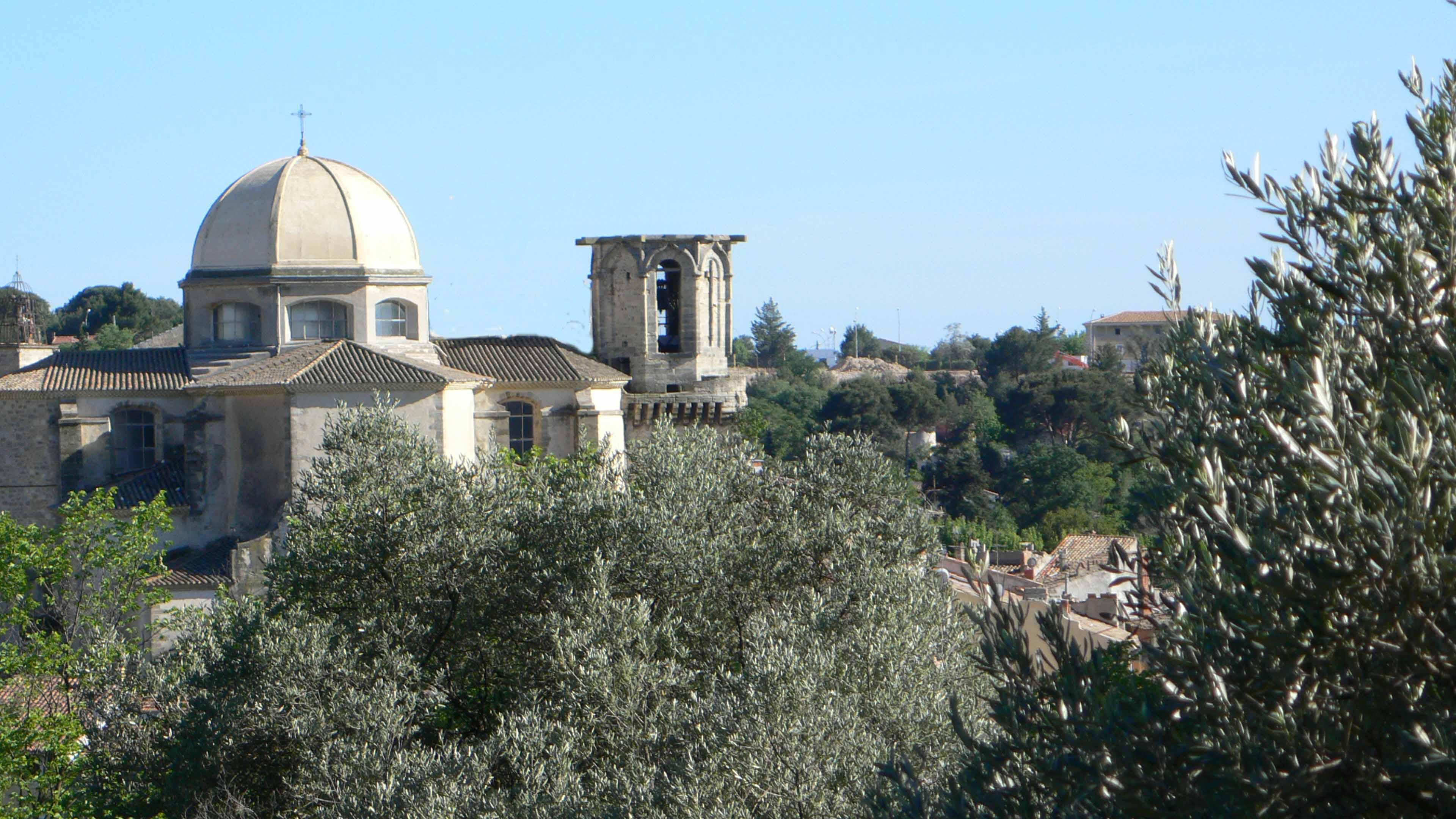 Vue de l'Eglise Notre Dame de l'Assomption du chemin de Croix de Lambesc